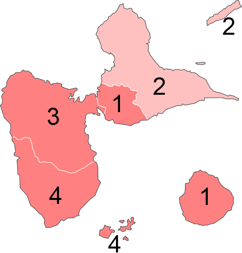 Résultats des élections législatives de Guadeloupe en 2012